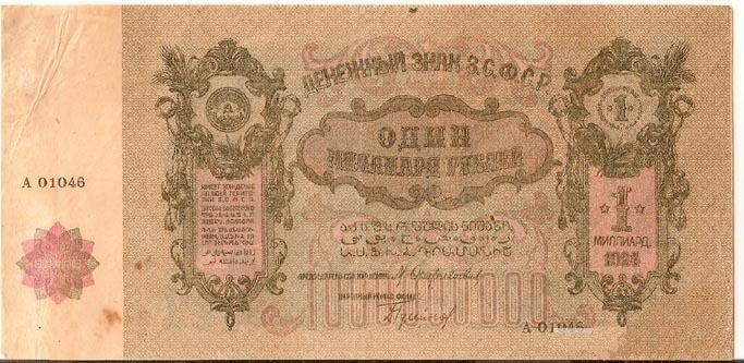 Миллиард рублей 1924 года (аверс)